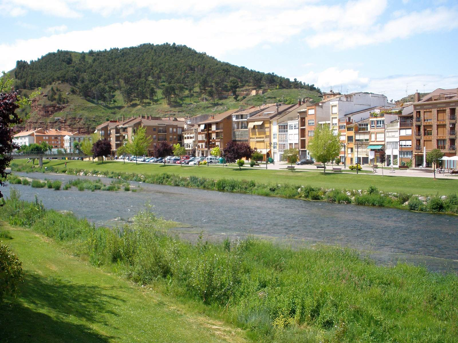 Nájera, La Rioja (España)